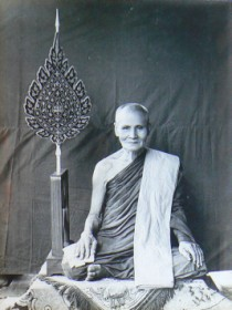 พระราชประสิทธิคุณ (ทิม ยสทินฺโน)